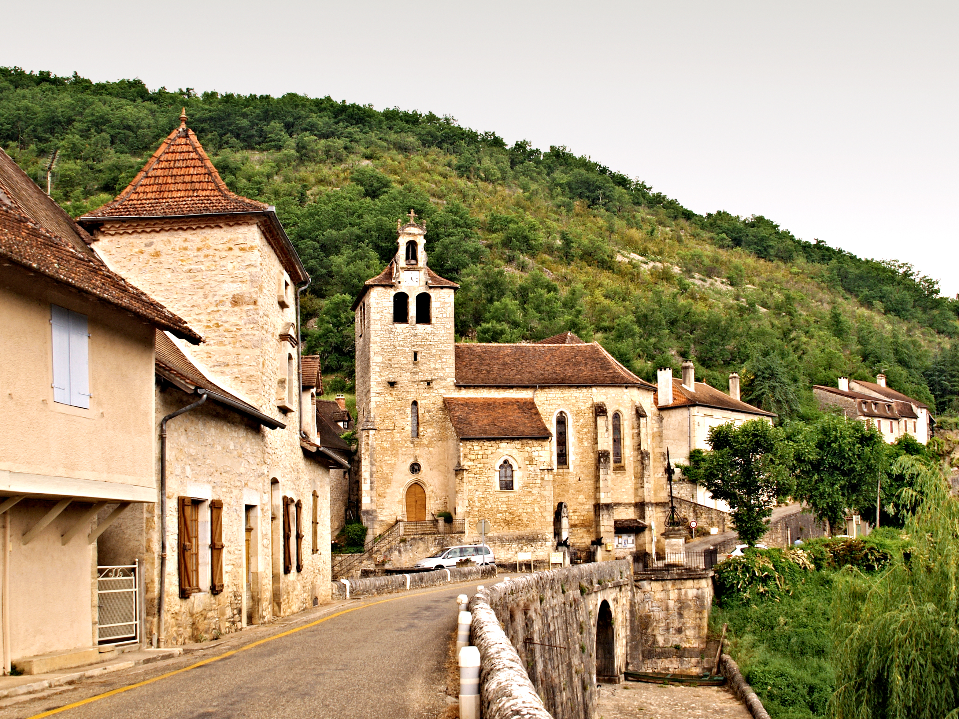 Larnagol (Lot) - L'église au bord de la D662